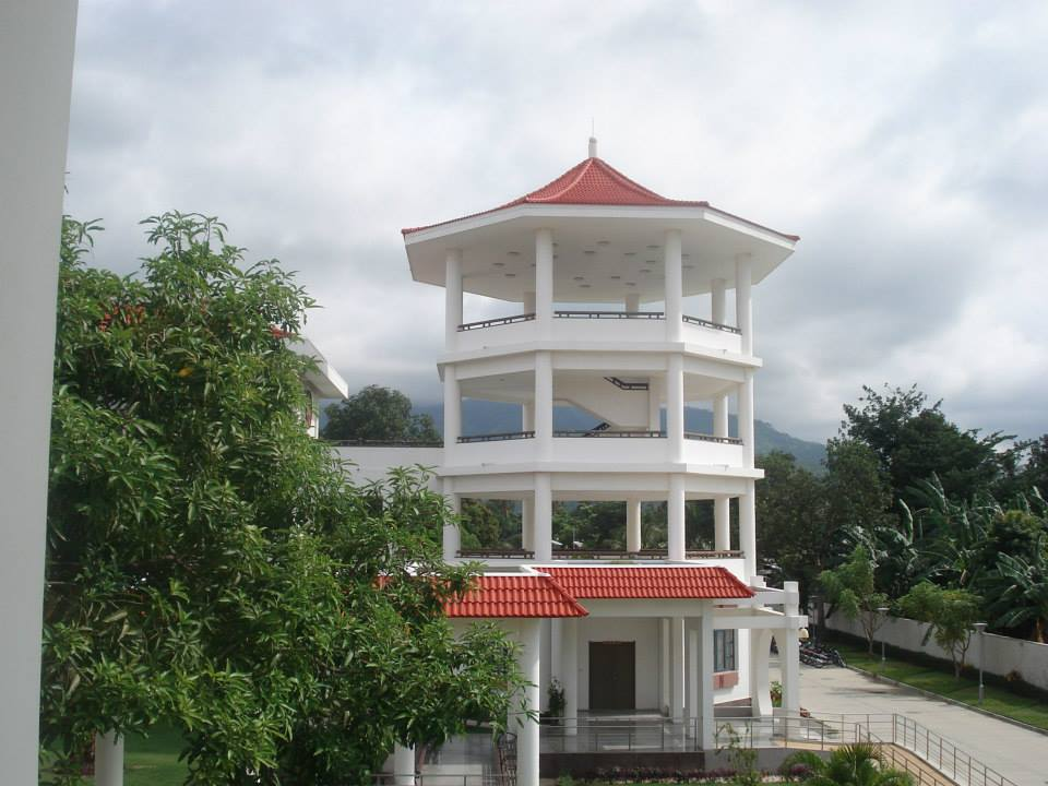 Dili